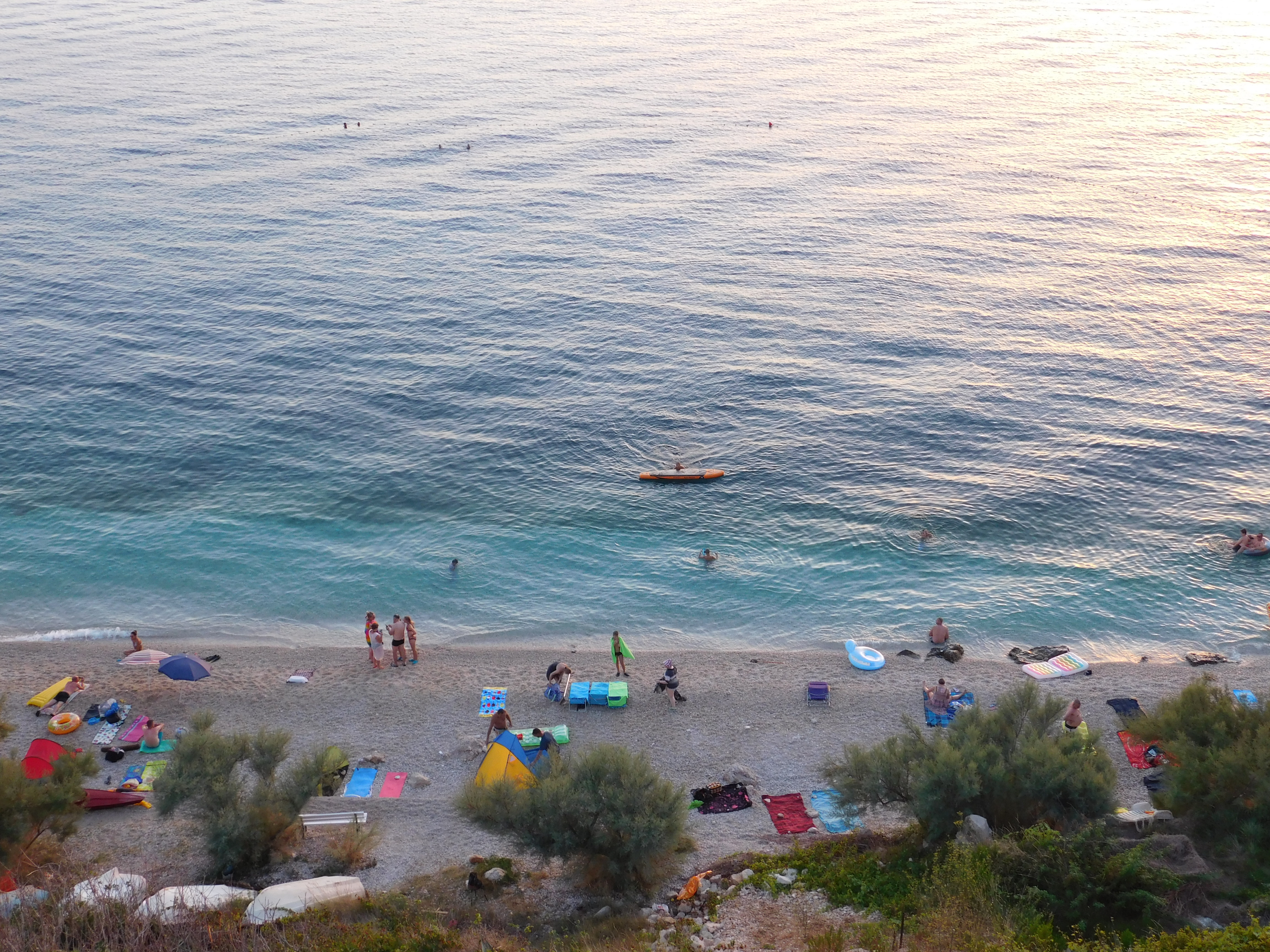 Pláž Vodice v Drašnici